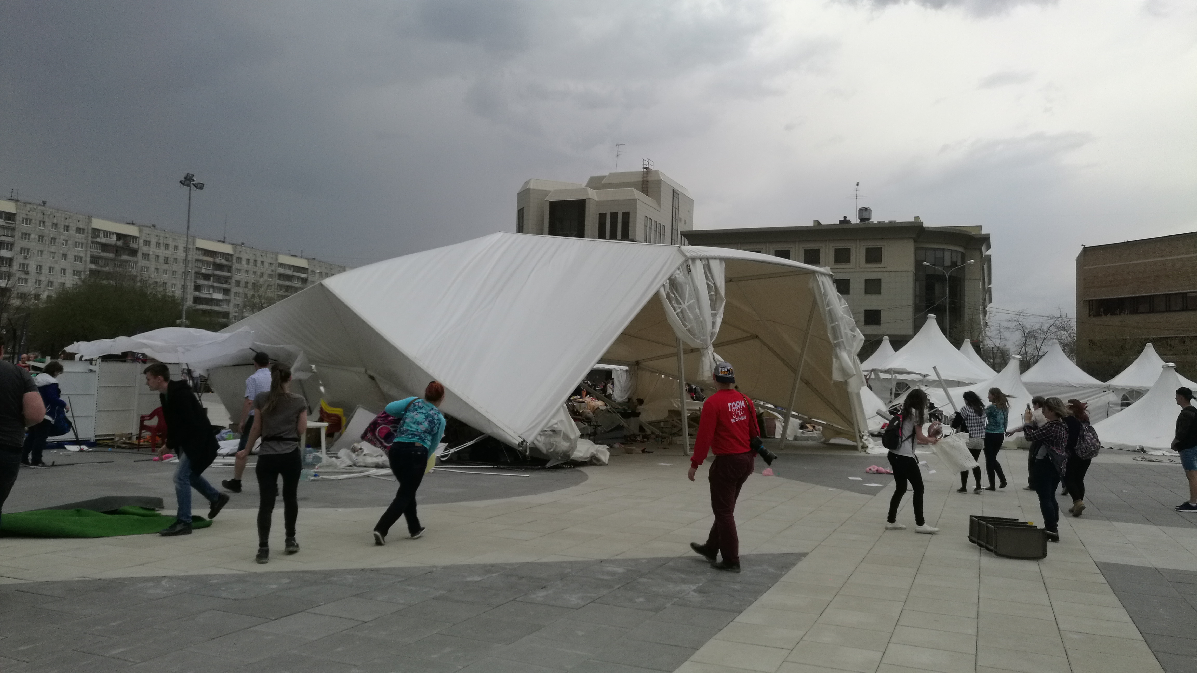 Tendoj kolapsintaj pro skvala ventego dum la festivalo "Varmego". Placo de la 400-jariĝo de Tjumeno. Tjumeno, Rusio.